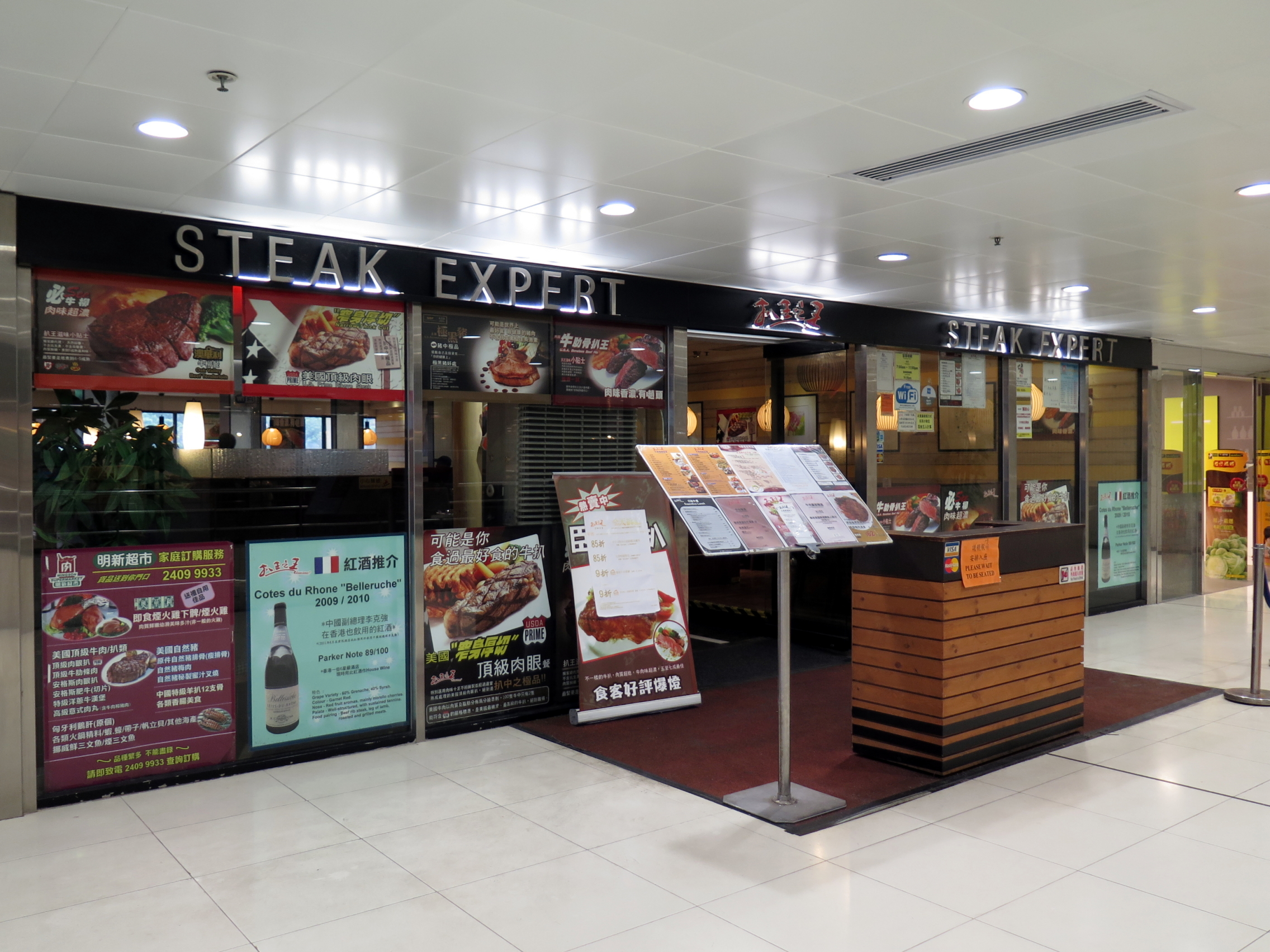 Steak Expert in Wai Wap Plaza